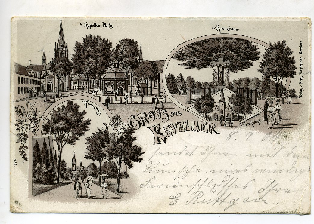 Gruss aus Kevelaer no 489 Kapellen Plaz -Kreuzbaum -Kreuzweg-Pfarrkirche